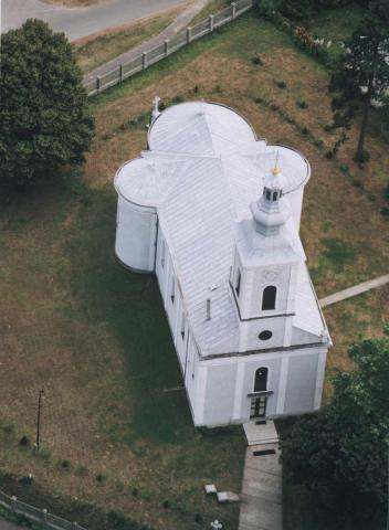 Nyirlugos Hungary aerialphotography